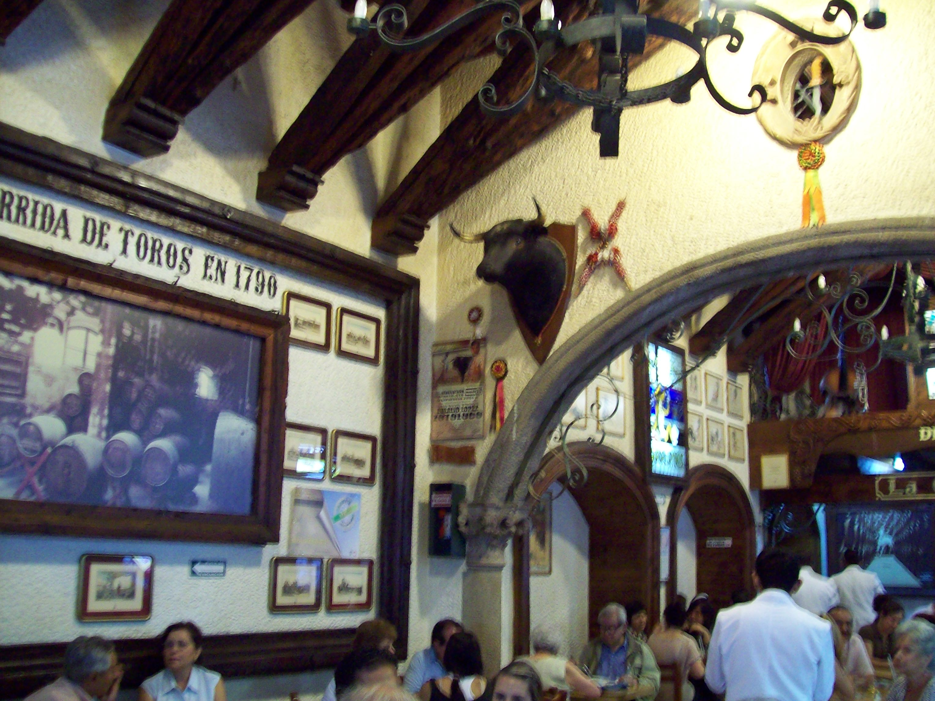 Cantina en Coyoacán, México